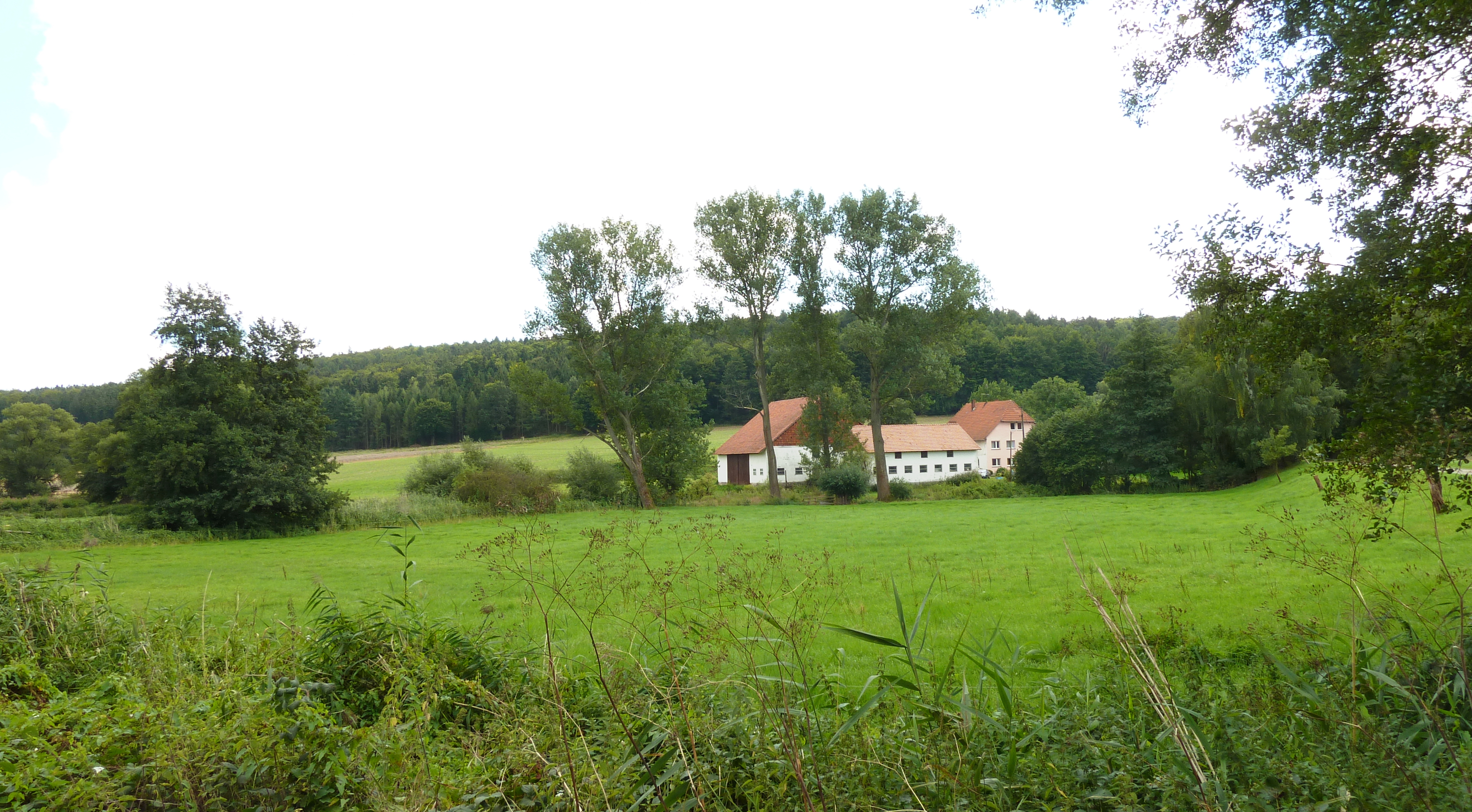 Tal der Suhle zwischen Landolfshausen und Seulingen im Landkreis Göttingen mit der Trudelshäuser Mühle. Gegend der Wüstung Drudewenshusen